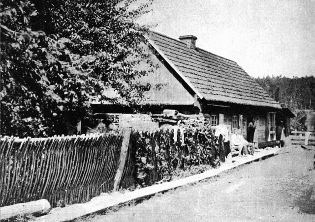 village Budy (near Białowieża) in 1882